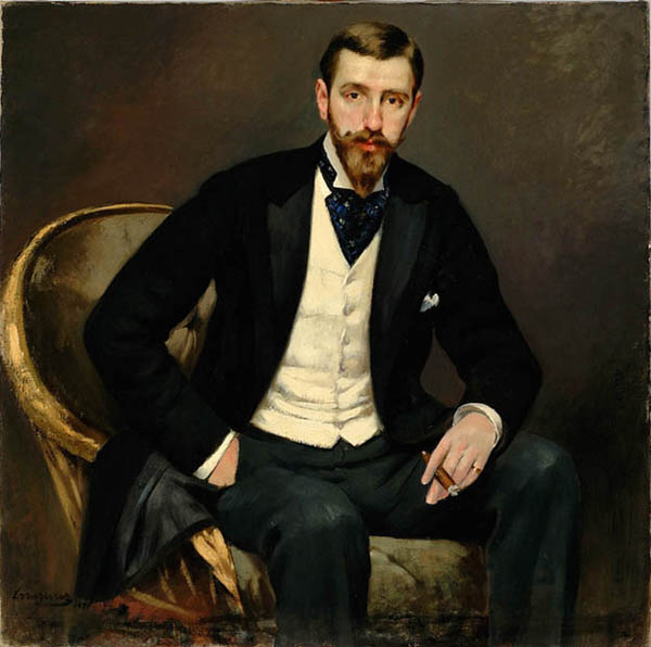 Retrato de su hermano diplomático y político Rafael Errázuriz